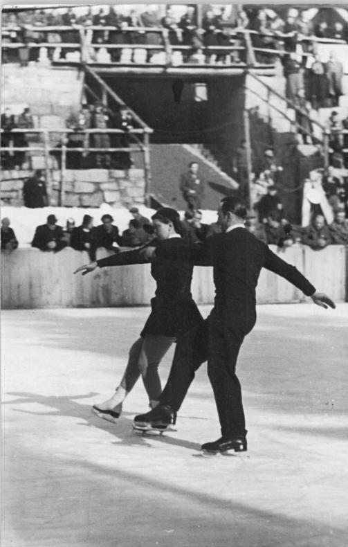 Carla Listing, Walter Baertling Aufn. Illus Gabriel 5665-50 23) Mlk Wintersportmeisterschaften in Schierke März 1950 Eiskunstlauf UBz: Meister der DDR im Eiskunst-Paarlauf, Klasse A Carla Listing ) Walter Baertling ) von ZSG-Industrie Leipzig